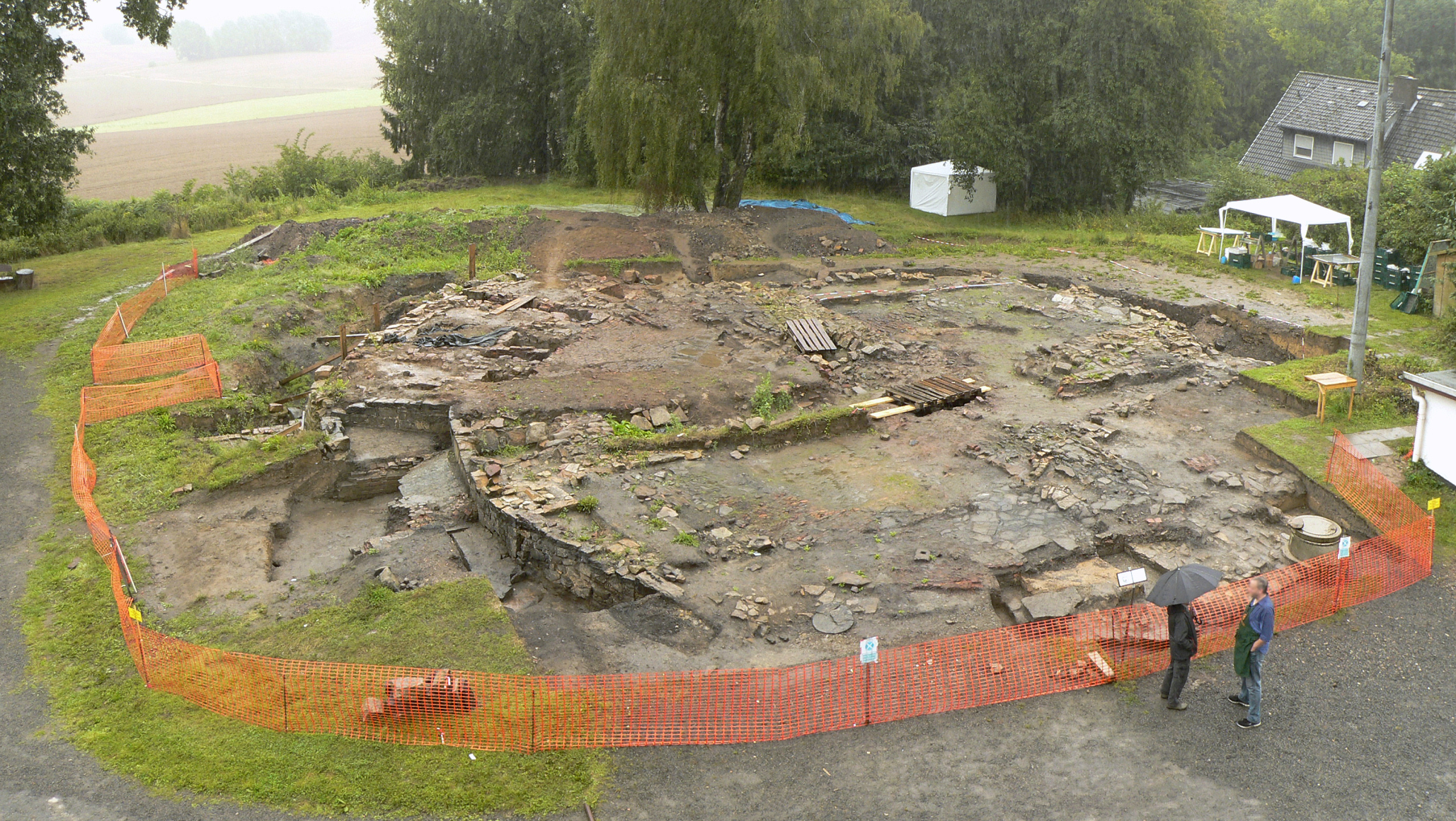 Glashütte Klein Süntel, Ausgrabungsgelände